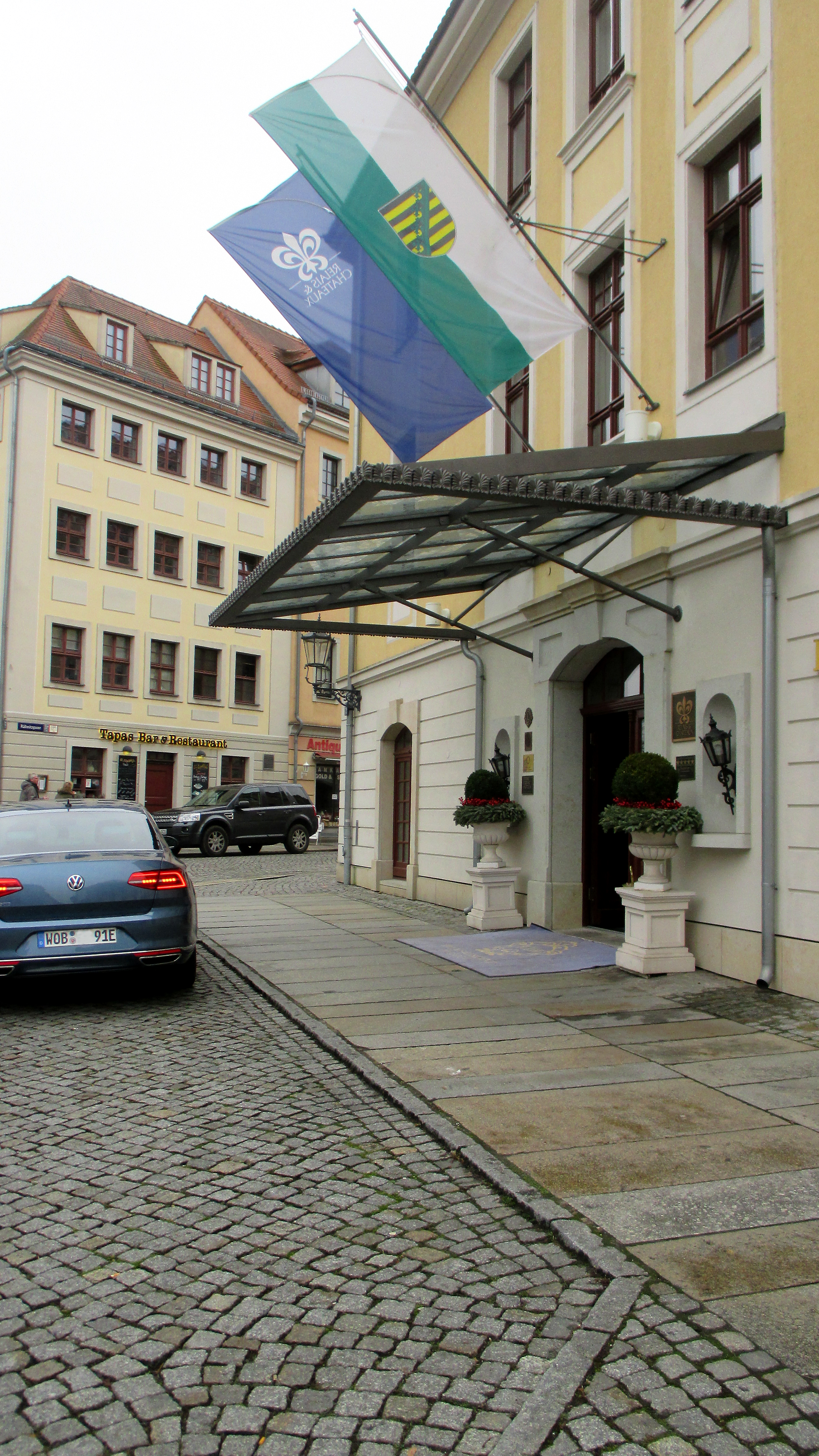 +Bülow Palais Dresden - Bild 002